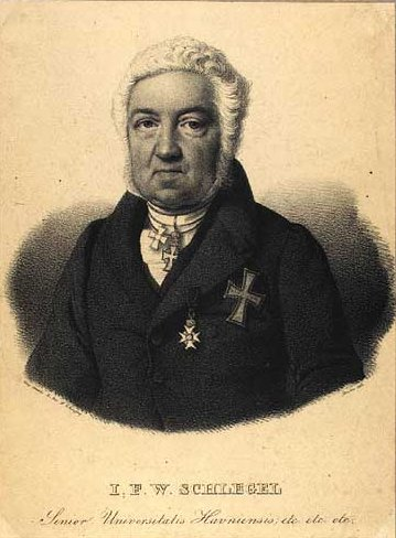 Johan Fr. Wilh. Schlegel (4.10.1765-19.7.1836), dansk retslærd